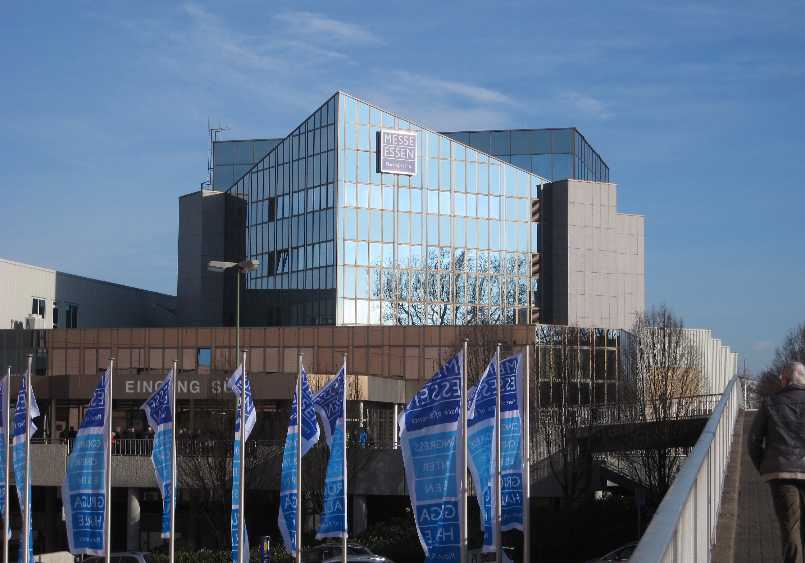 Messe Essen, Eingang Süd, Essen-Rüttenscheid.